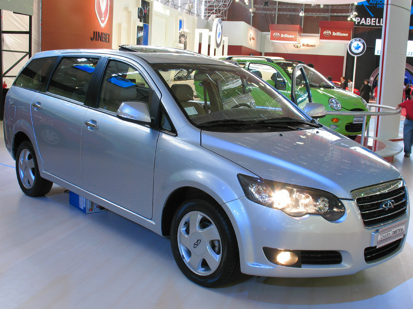 2008 Chery Destiny (Chery V5)